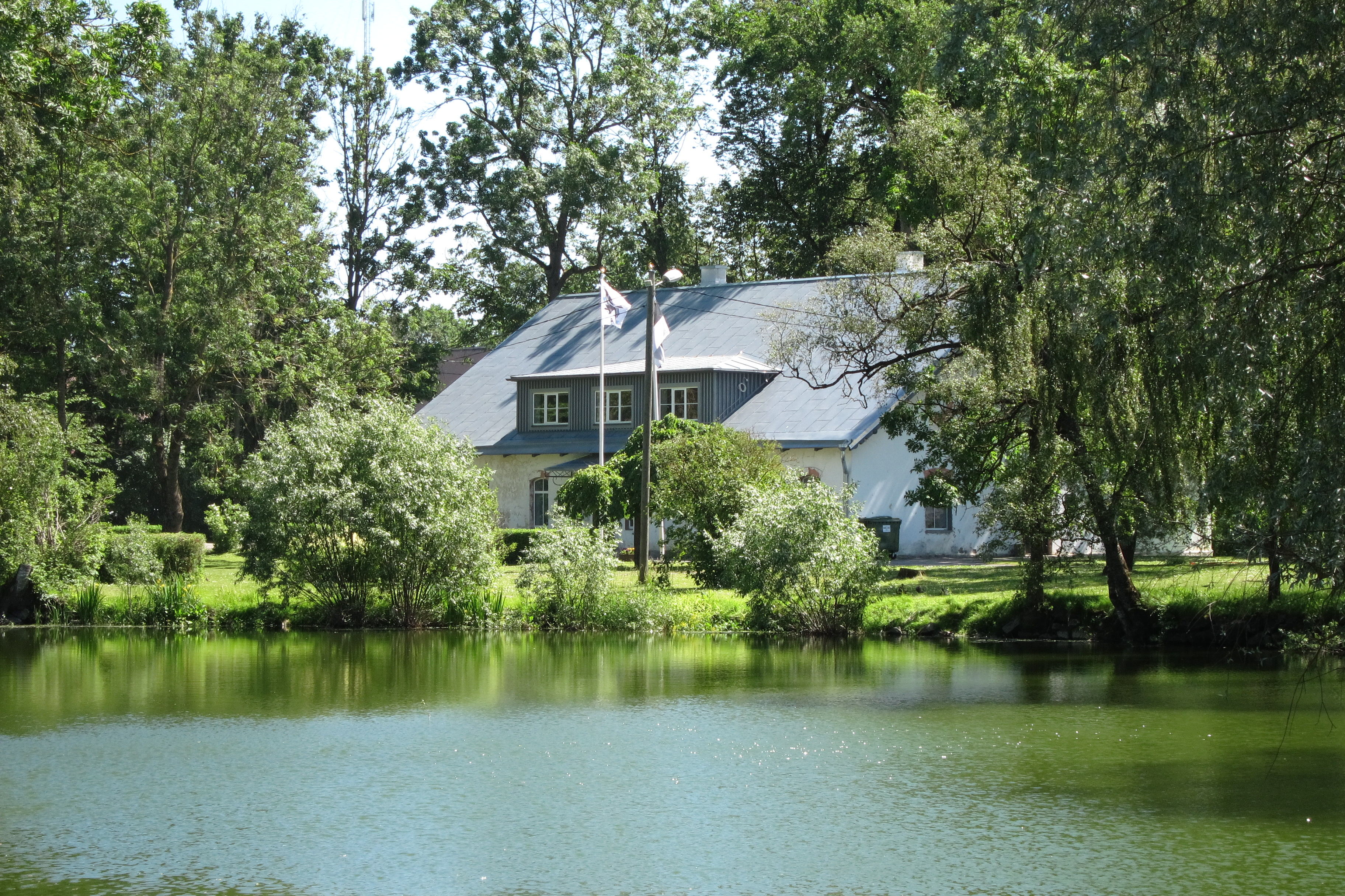 Endine Kehtna mõisa valitsejamaja, praegune vallamaja